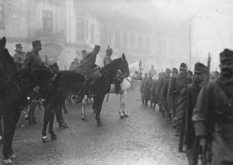 General v. Mackensen in Bukarest Parade über die einziehenden österr.- ung. Truppen